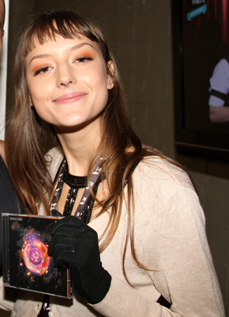 VMB - São Paulo/SP - 20/10/2011